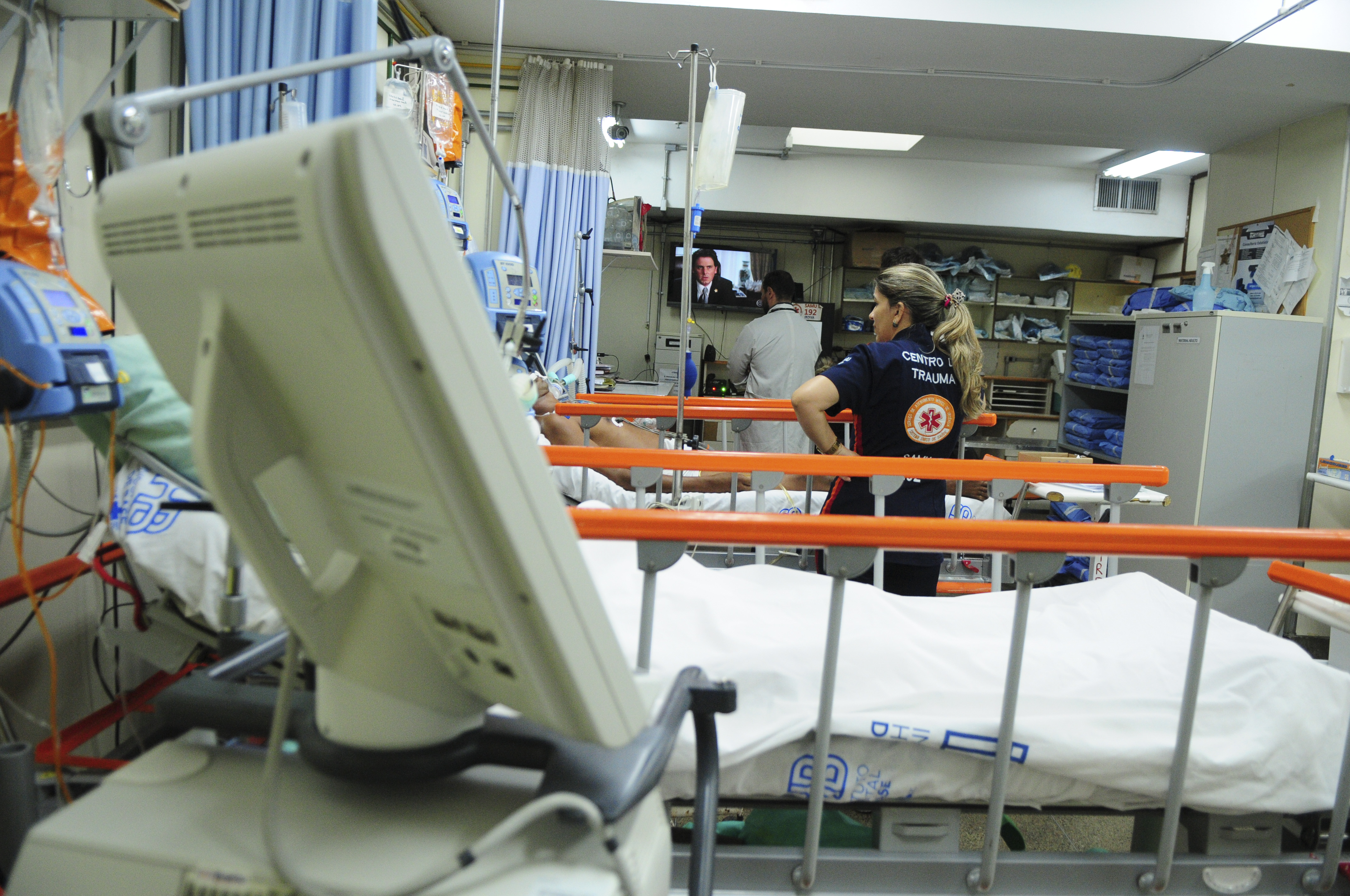 Instituto Hospital de Base do Distrito Federal (IHBDF), Plano Piloto, Brasília, DF, Brasil 23/4/2018 Foto: Pedro Ventura/Agência Brasília. Inspirado na Rede Sarah, o Instituto Hospital de Base é um serviço social autônomo, com regulamentos próprios para compras e contratações, o que assegura agilidade ainda maior em comparação com o Hospital da Criança. O modelo entrou em funcionamento em janeiro deste ano. Leia a matéria no site da Agência Brasília